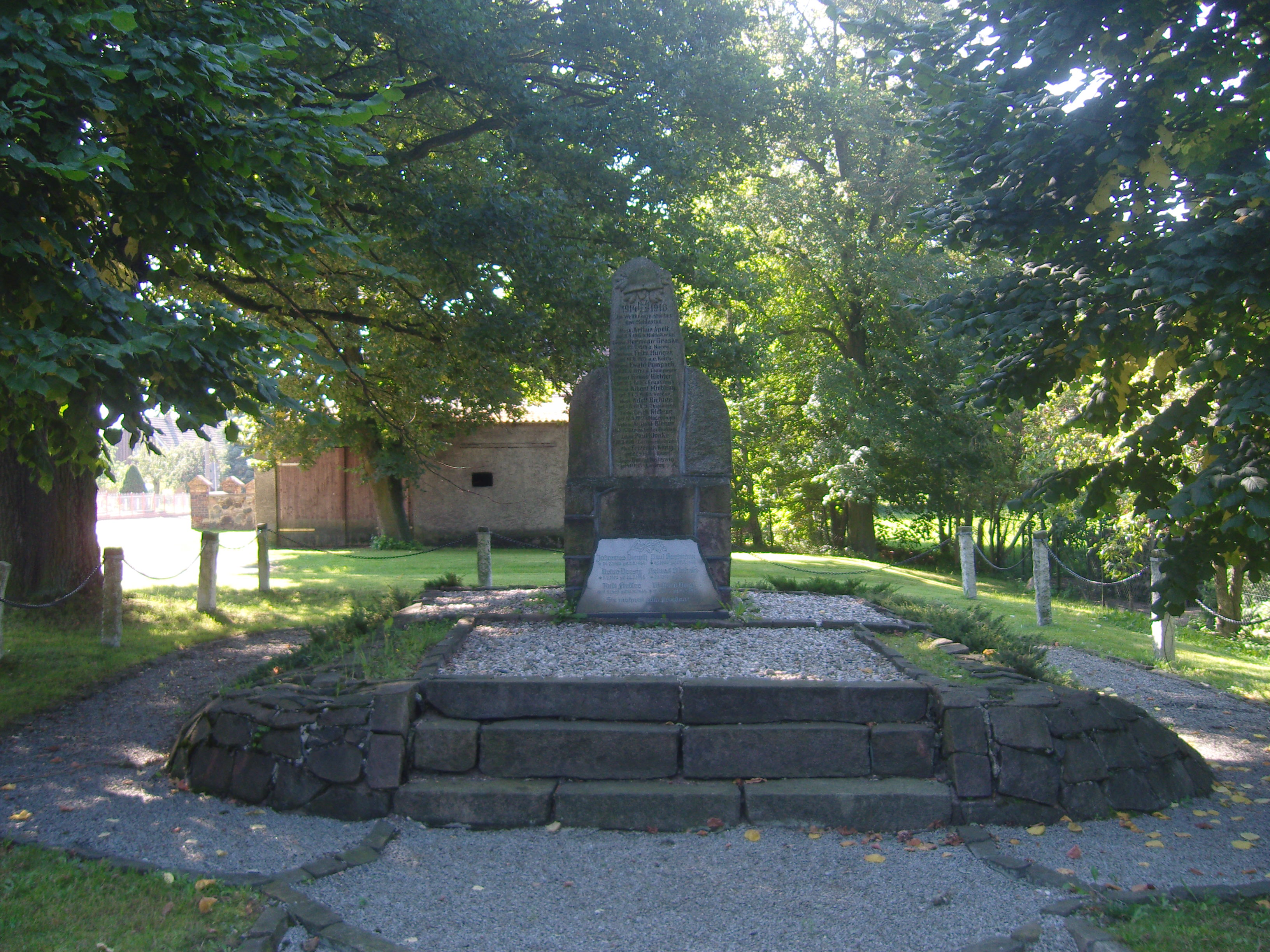 Kriegerdenkmal für die Gefallenen des Ersten Weltkriegs in Bronkow